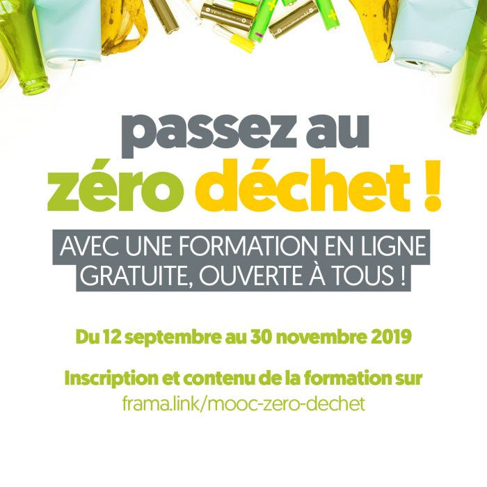 annonce du mooc zéro déchet primé comme meilleur mooc de l'année en 2019